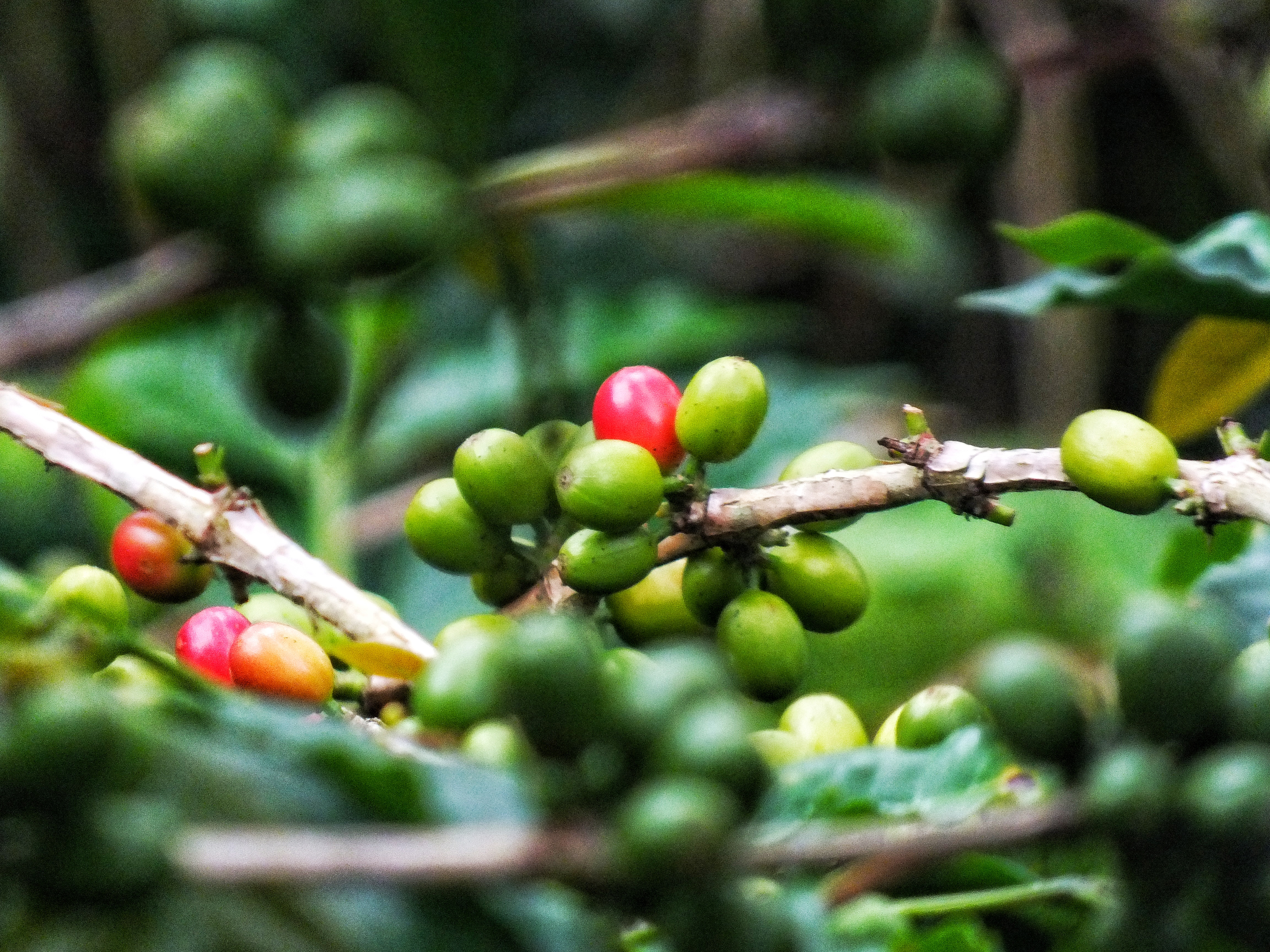 Kopi merupakan hasil pertanian terbesar kabupaten Aceh Tengah, yang dikenal luas dengan nama Kopi Gayo. Kopi yang dihasilkan merupakan jenis Arabika. Sejarah kopi Gayo dimulai sejak era penjajahan Belanda, benih kopi dibawa oleh Belanda untuk diujicoba tanam dan ternyata iklim kabupaten Aceh Tengah sangat cocok untuk budidaya kopi hingga berkembang seperti sekarang.